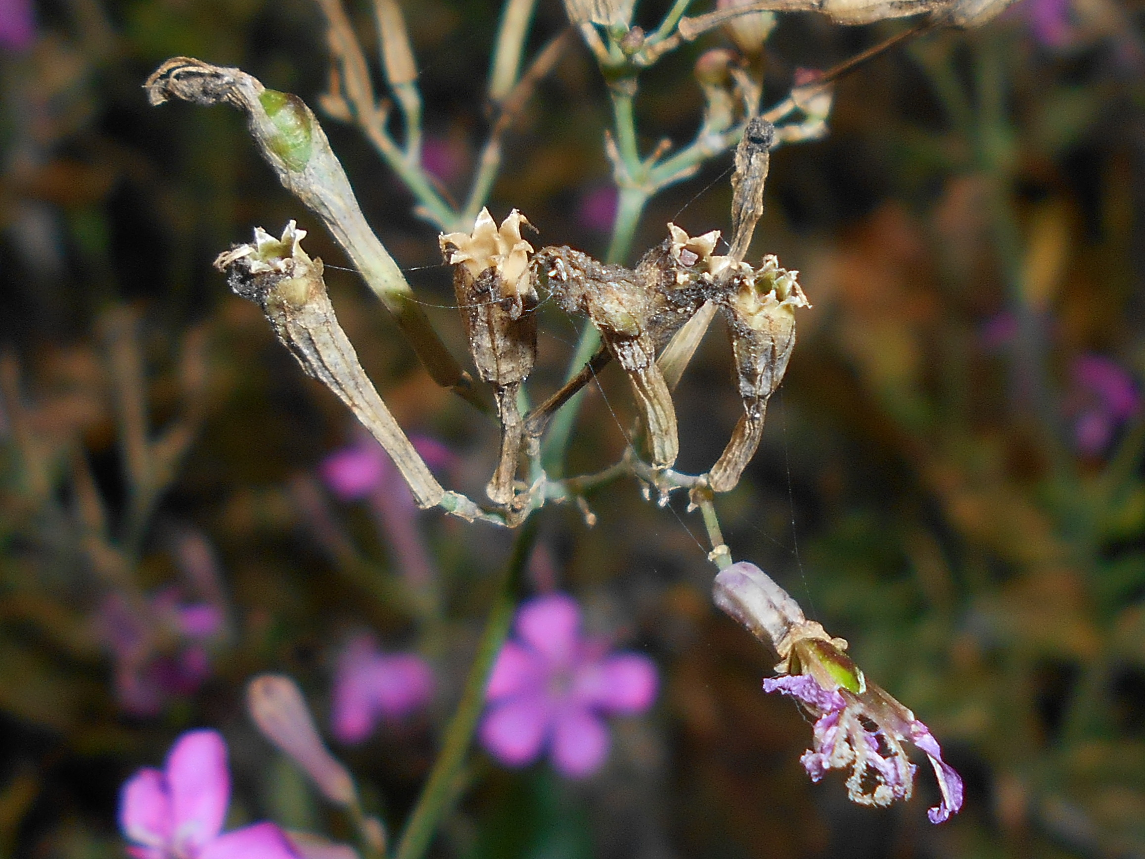 Lepnica litewska (Silene lithuanica), Ogród Botaniczny UMCS w Lublinie.